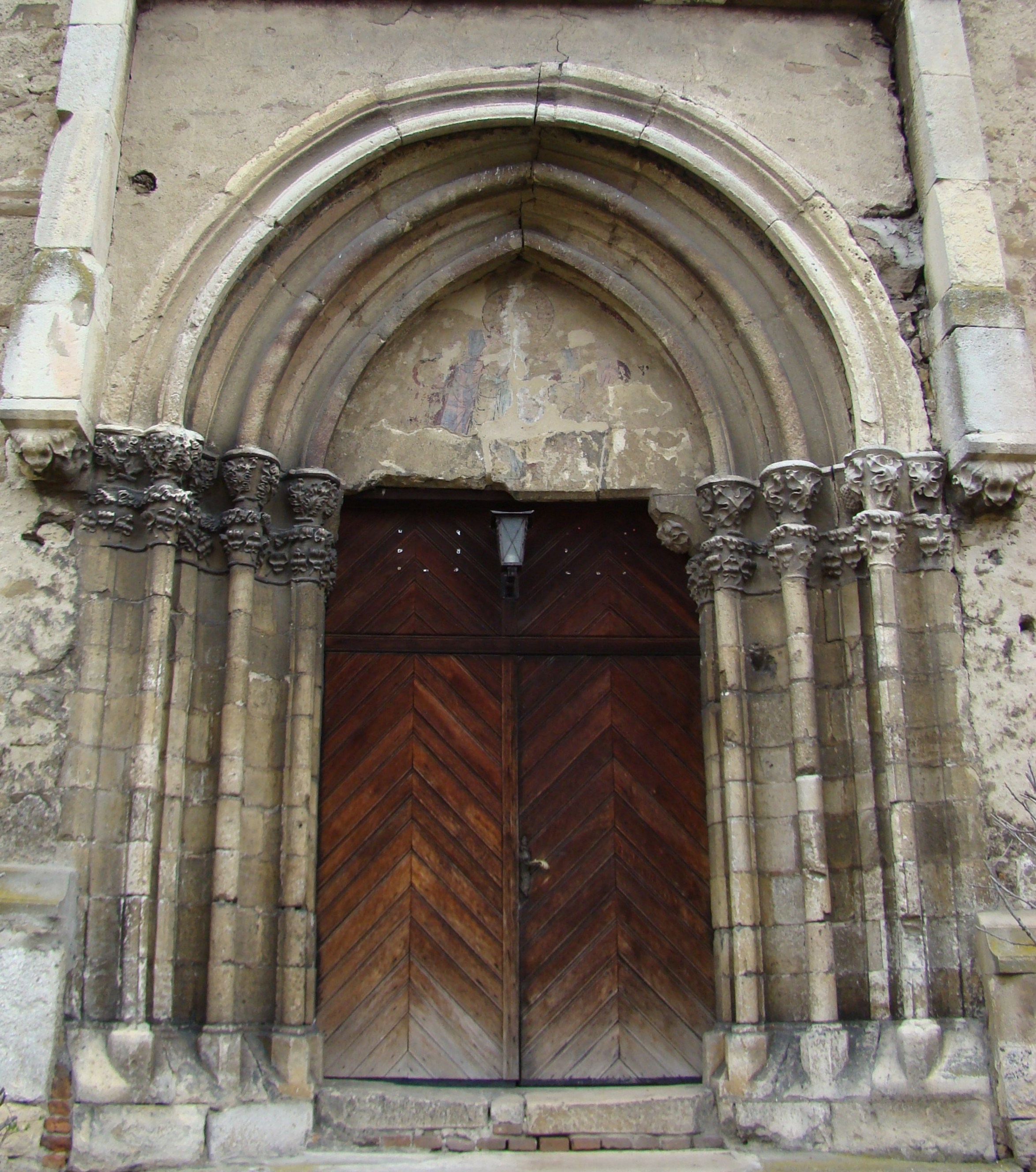 Biserica evanghelică, sat DÂRLOS; comuna DÂRLOS, județul Sibiu